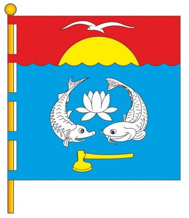 Прапор села Плавні (Ренійський район)